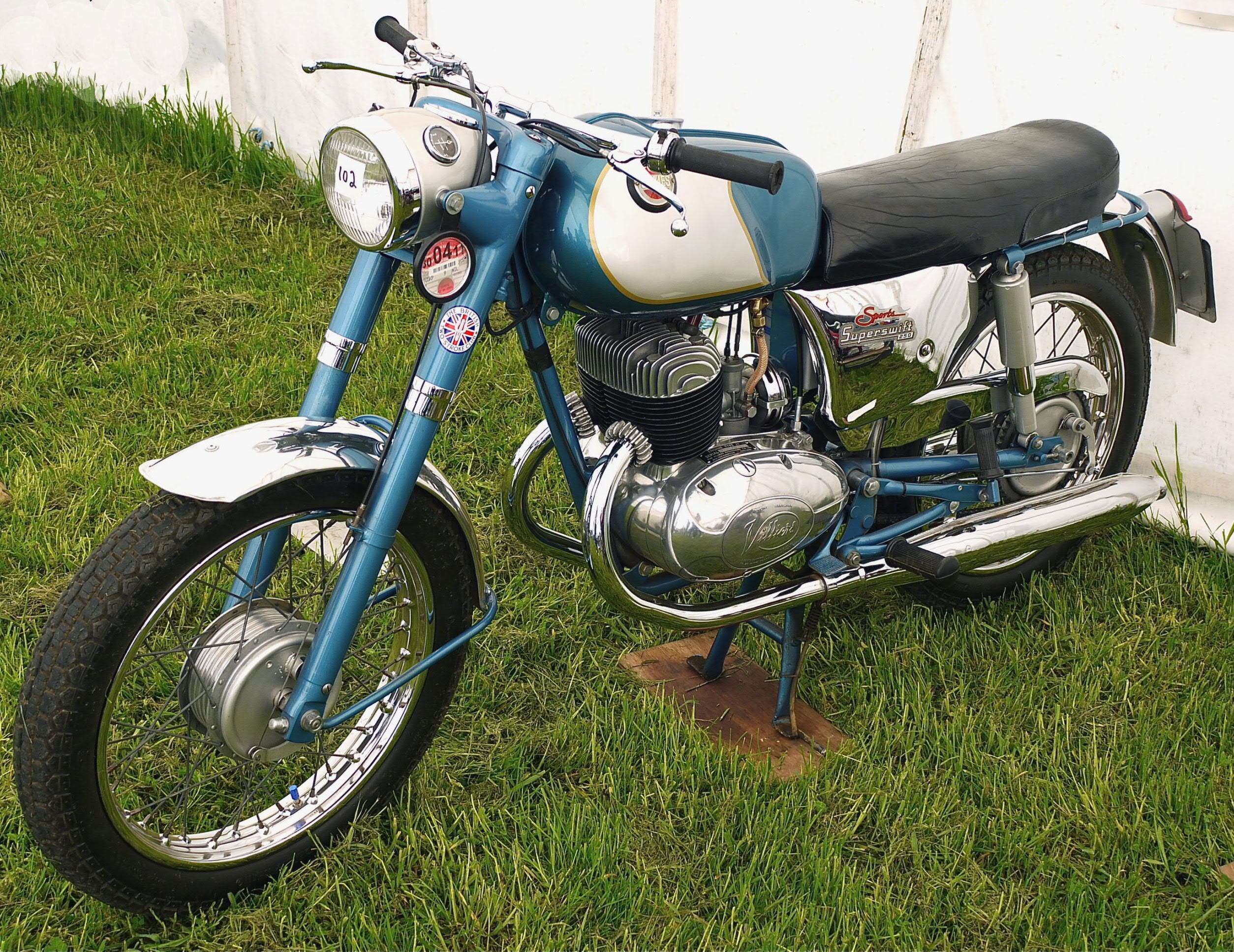 Panasonic G1 14-45 Lens